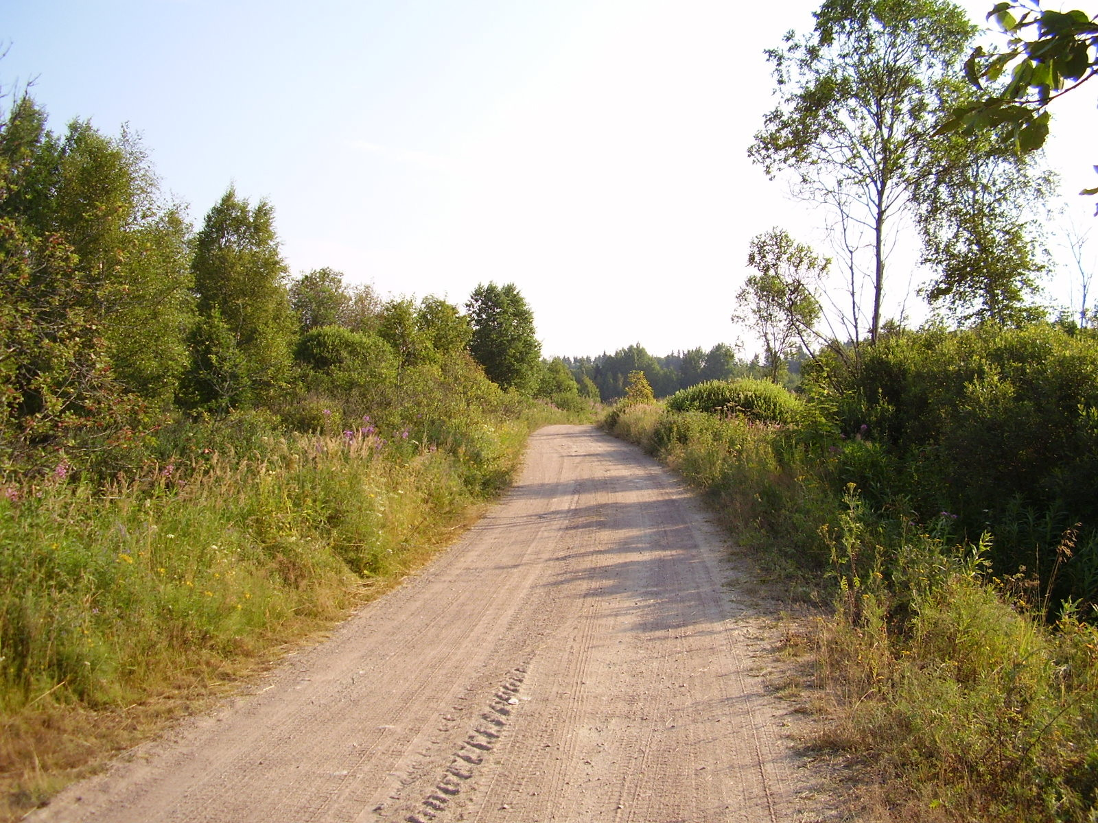 Ala-Sommeen ja Ylä-Sommeen välinen tie, johon syntyi Sommeen-Porlammin motti vuonna 1941